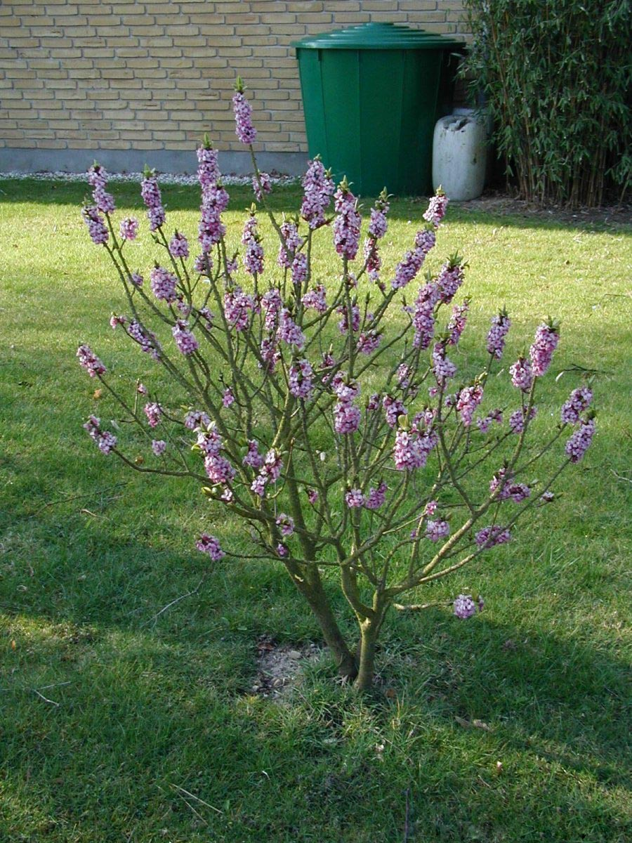 Daphne mezereum: Flowering habit. Photo: Sten Porse